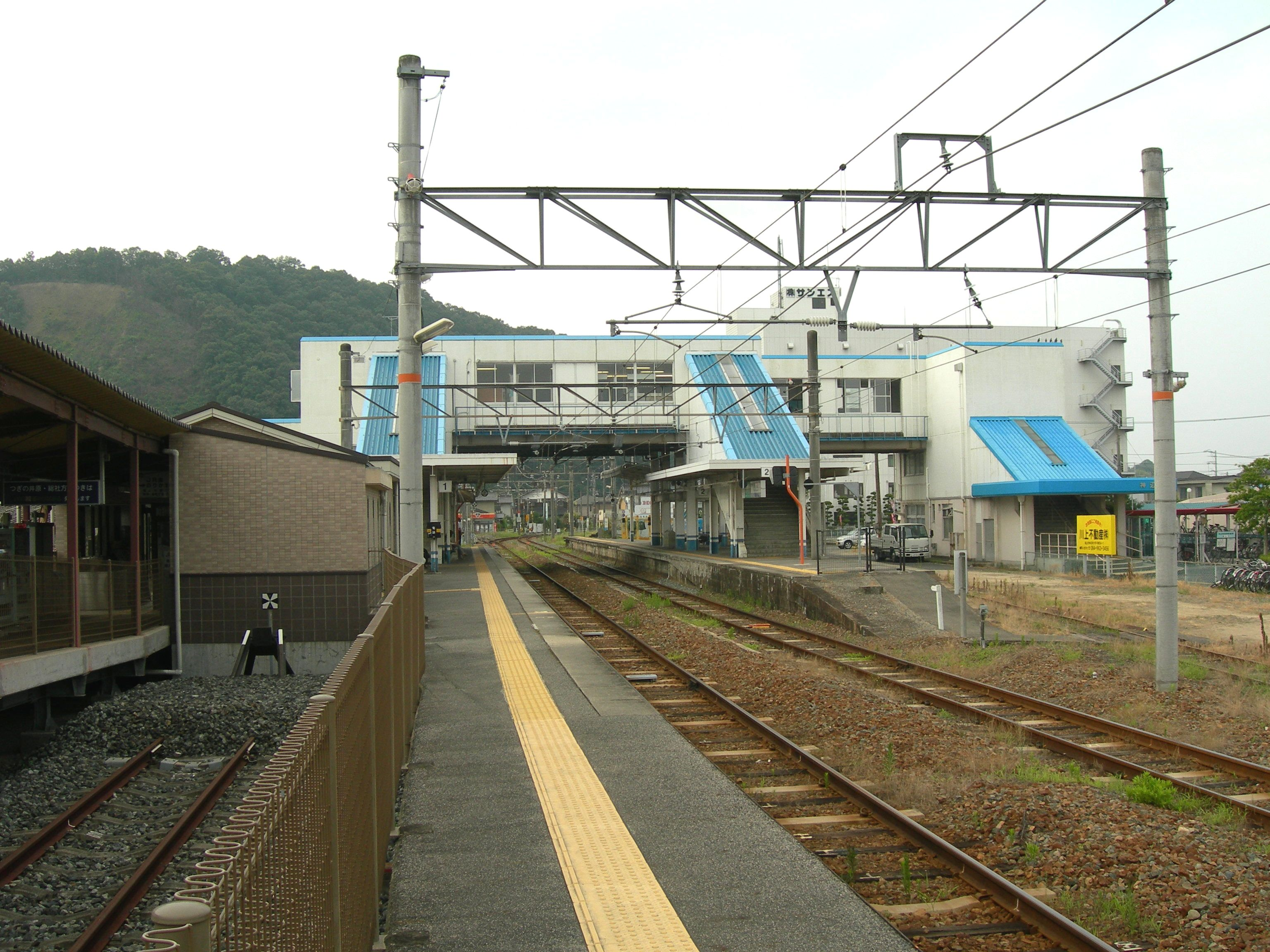 神辺駅ホーム